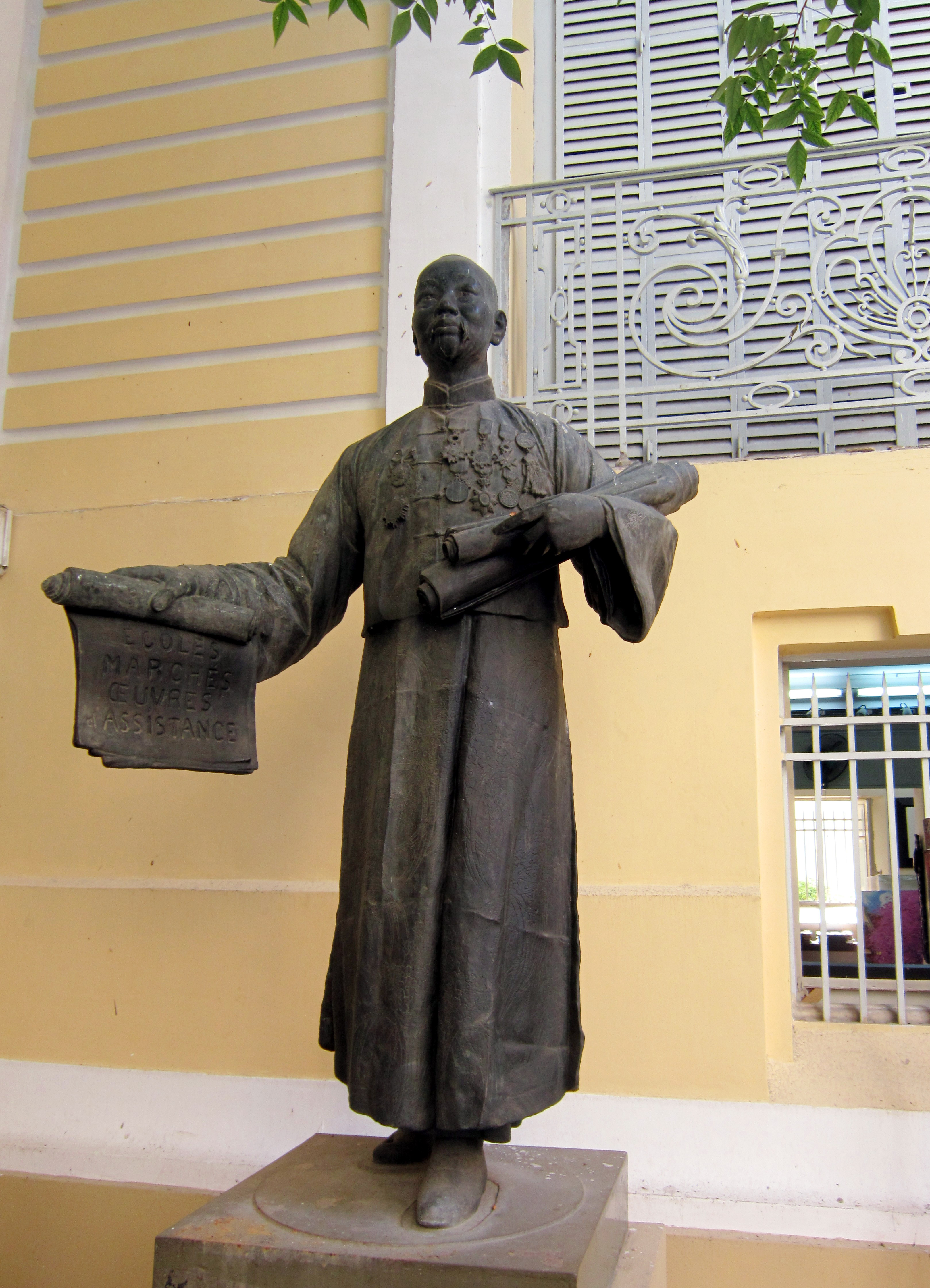 Tượng thương gia Quách Đàm (1863-1927), hiện đang trưng bày trong Bảo tàng Mỹ thuật Thành phố Hồ Chí Minh.